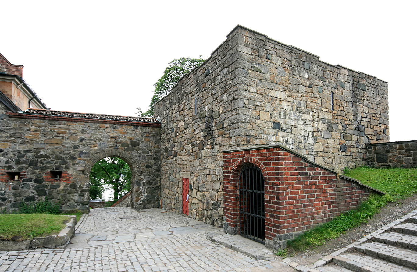 Knutstårnet, Akershus festning, Oslo. Bygd ca. 1300. Brannskadd 1527; delvis nedrevet på 1700-tallet.